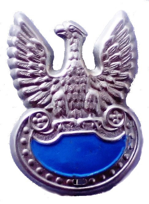 Orzełek Marynarki Wojennej ludowego Wojska Polskiego